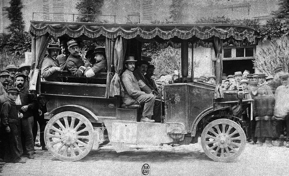 Le train Scotte n°10 au Paris-Rouen 1894 (omnibus de M. J. Scotte, Epernay 51), Voitures sans chevaux. Concours organisé par le Petit Journal, 22 juillet 1894, coll. R.Girard BNF/Gallica Premier omnibus à traction mécanique - Société des Chaudières et Voitures à Vapeur système Scotte et Buffaud & Robatel